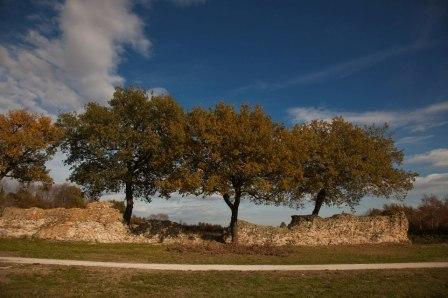 Mura di Urbs Salvia-lato nord.jpg